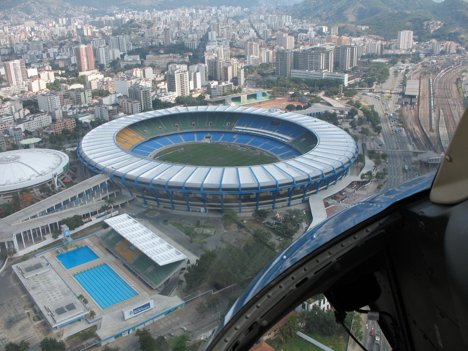 Maracanã visto de cima